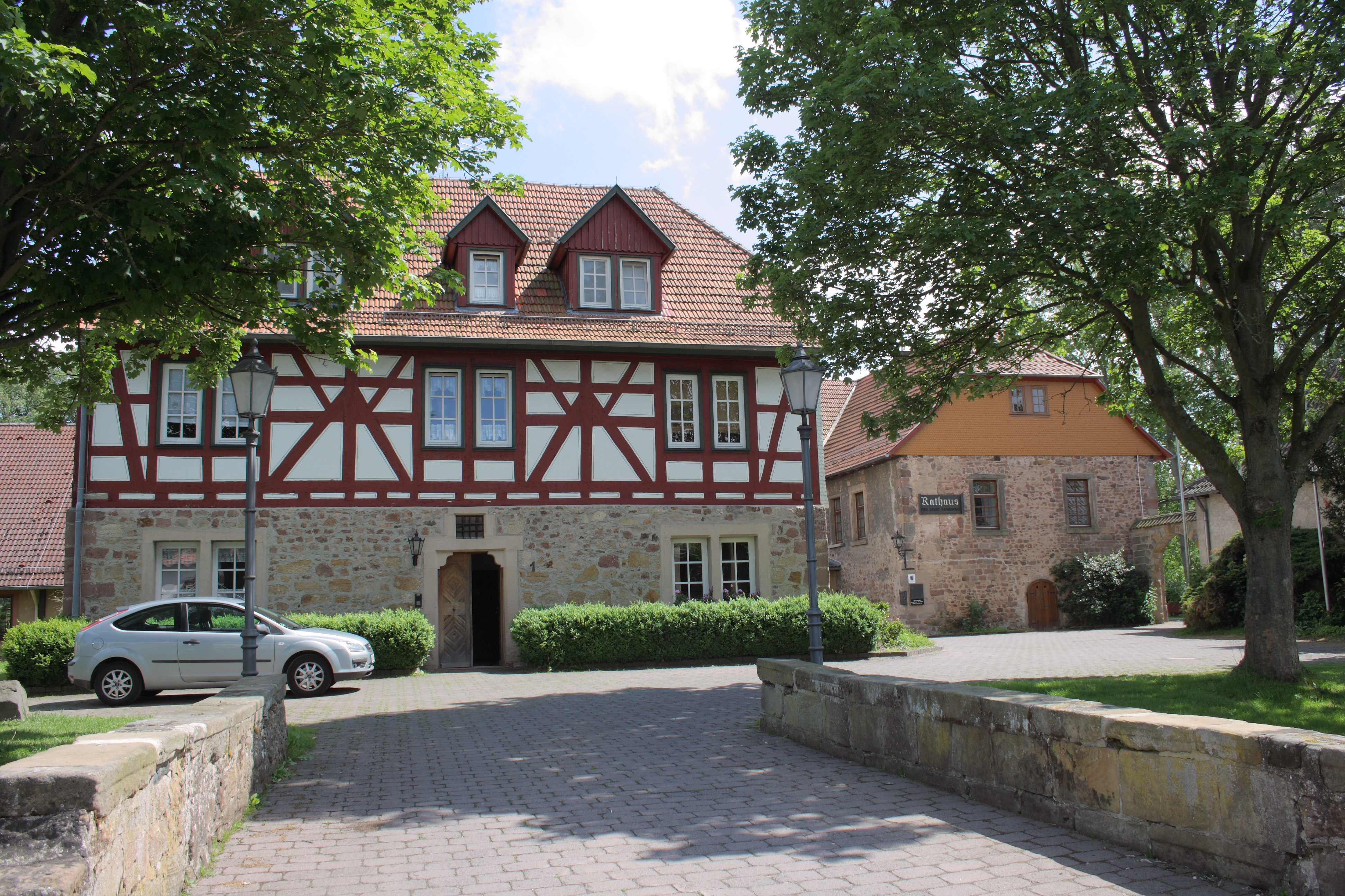 Rathaus, ehemalige Johanniter-Komturei, in Grebenau im Vogelsbergkreis (Hessen)